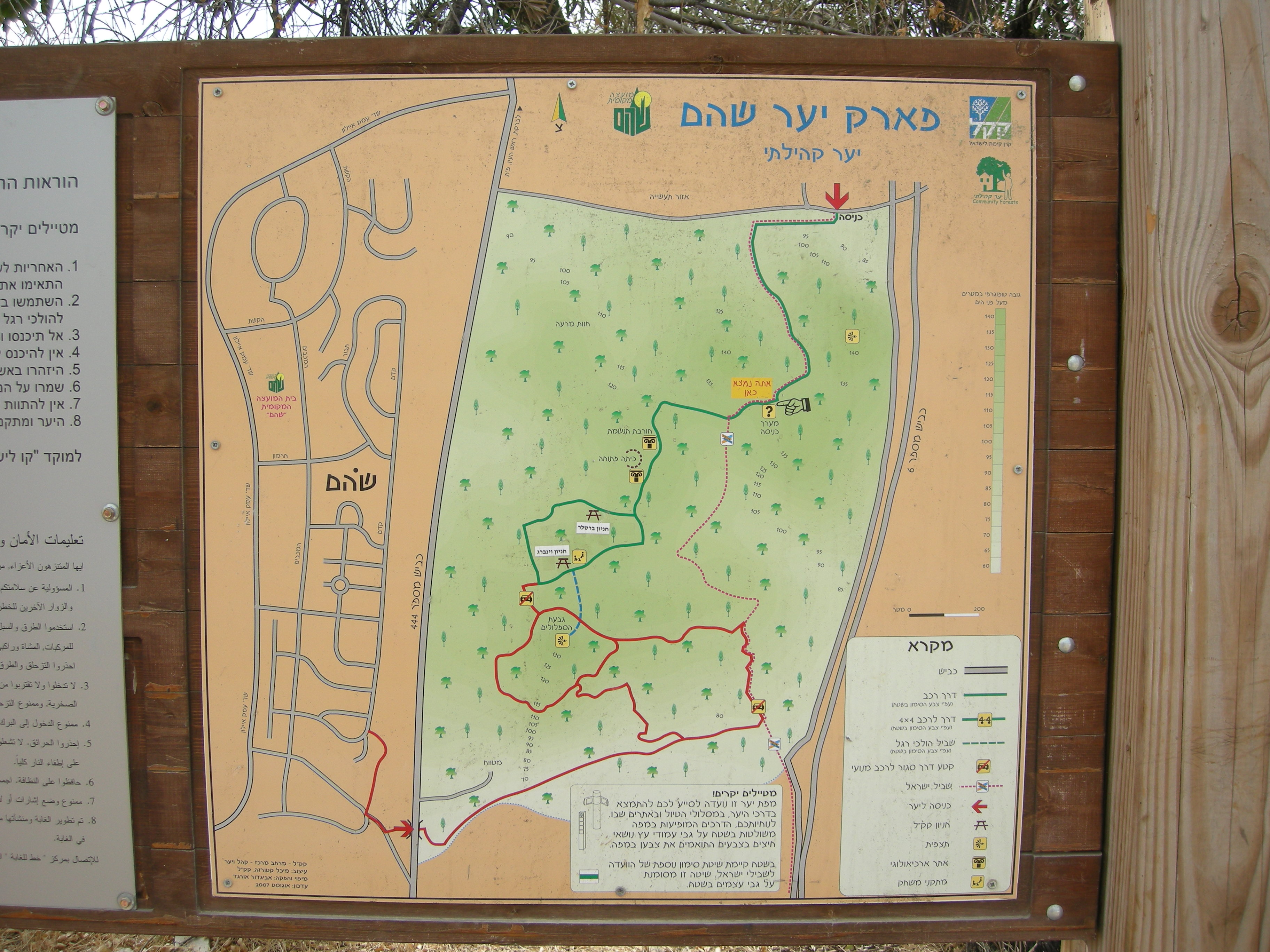 Israeli National trail